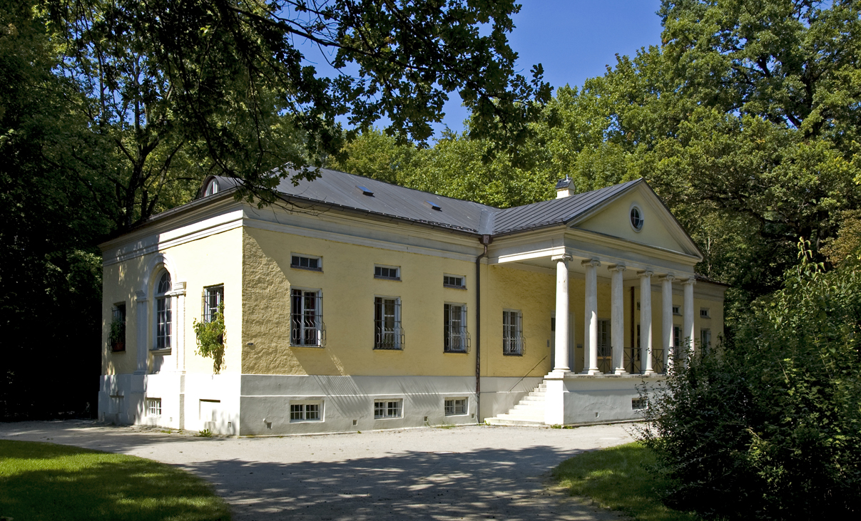 Englischer Garten - München Das Rumfordhaus, ein klassizistisches Gebäude im Englischen Garten. Es ist benannt nach dem Reichsgrafen von Rumford, Sir Benjamin Thompson.